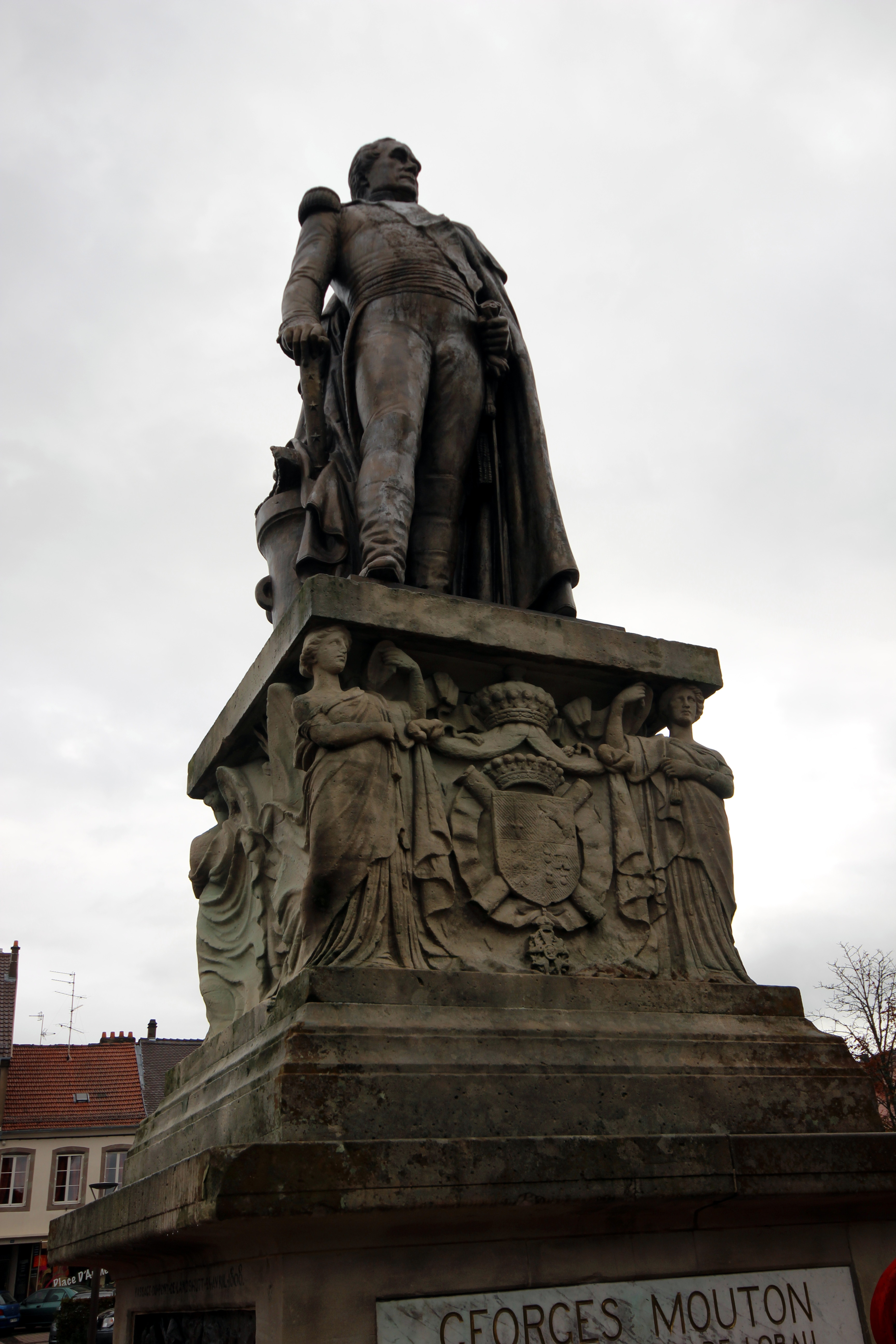 Phalsbourg